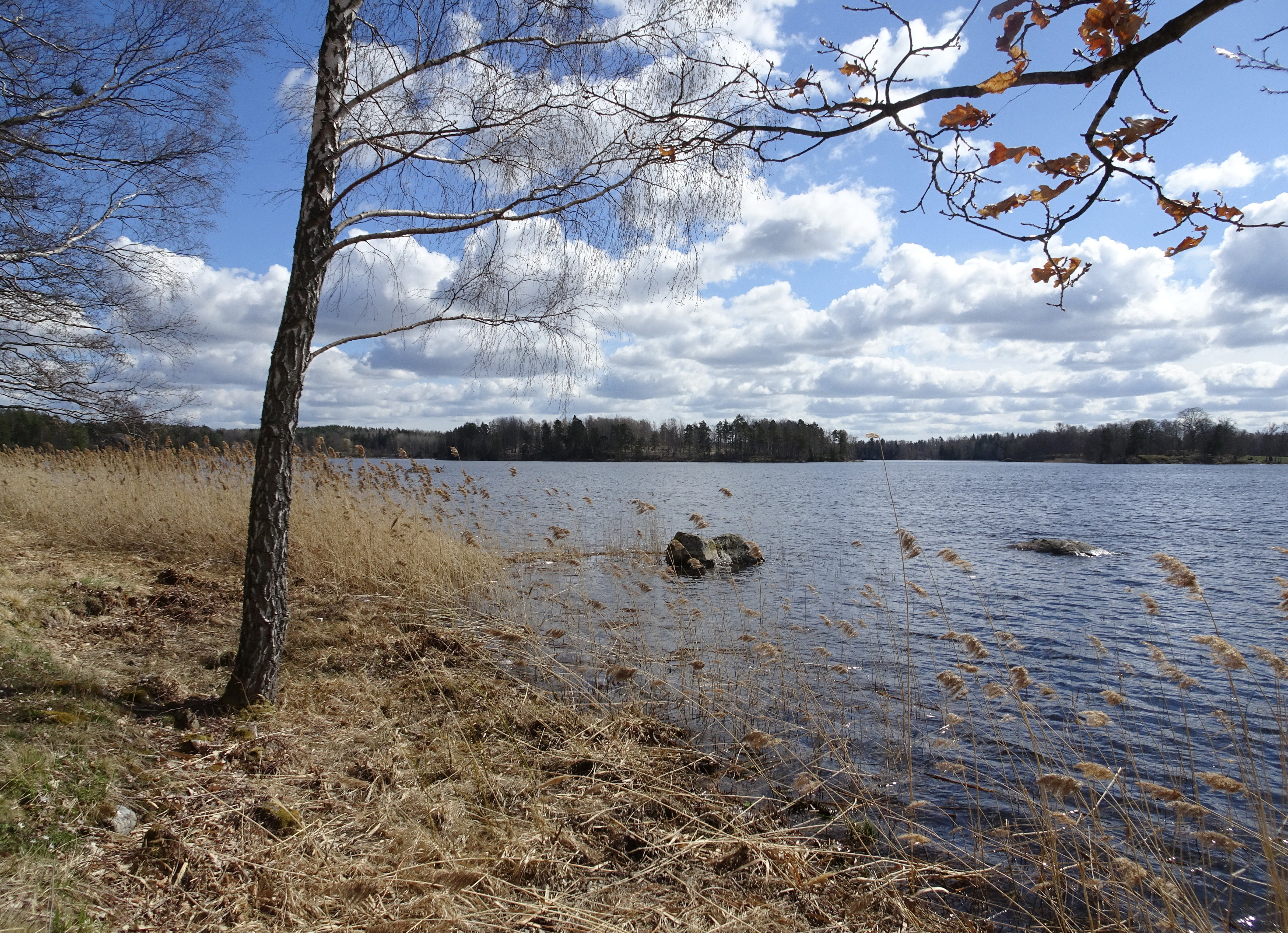 Sjön Vällingen, Södertälje kommun